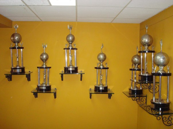 algunas copas del America de Cali